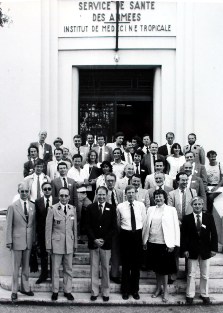 Groupe des intervenants et participants à la première journée de santé des collectivités organisée à l'Ecole du Pharo (Marseille) en 1983